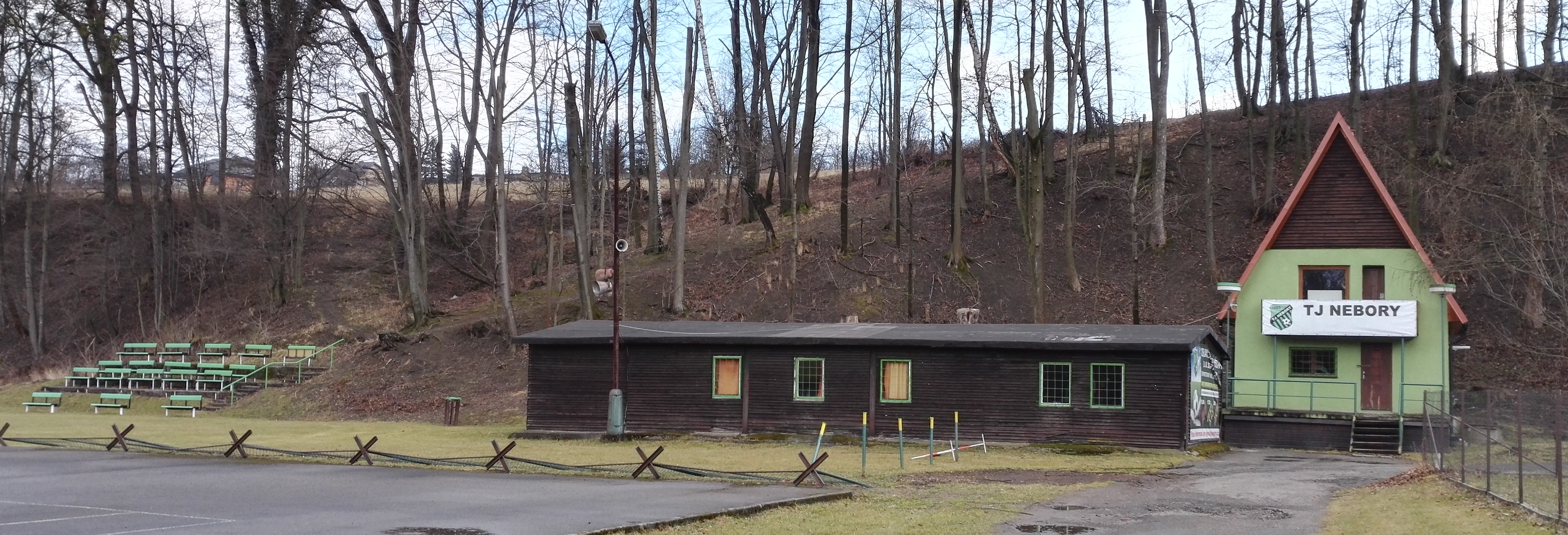 TJ Nebory